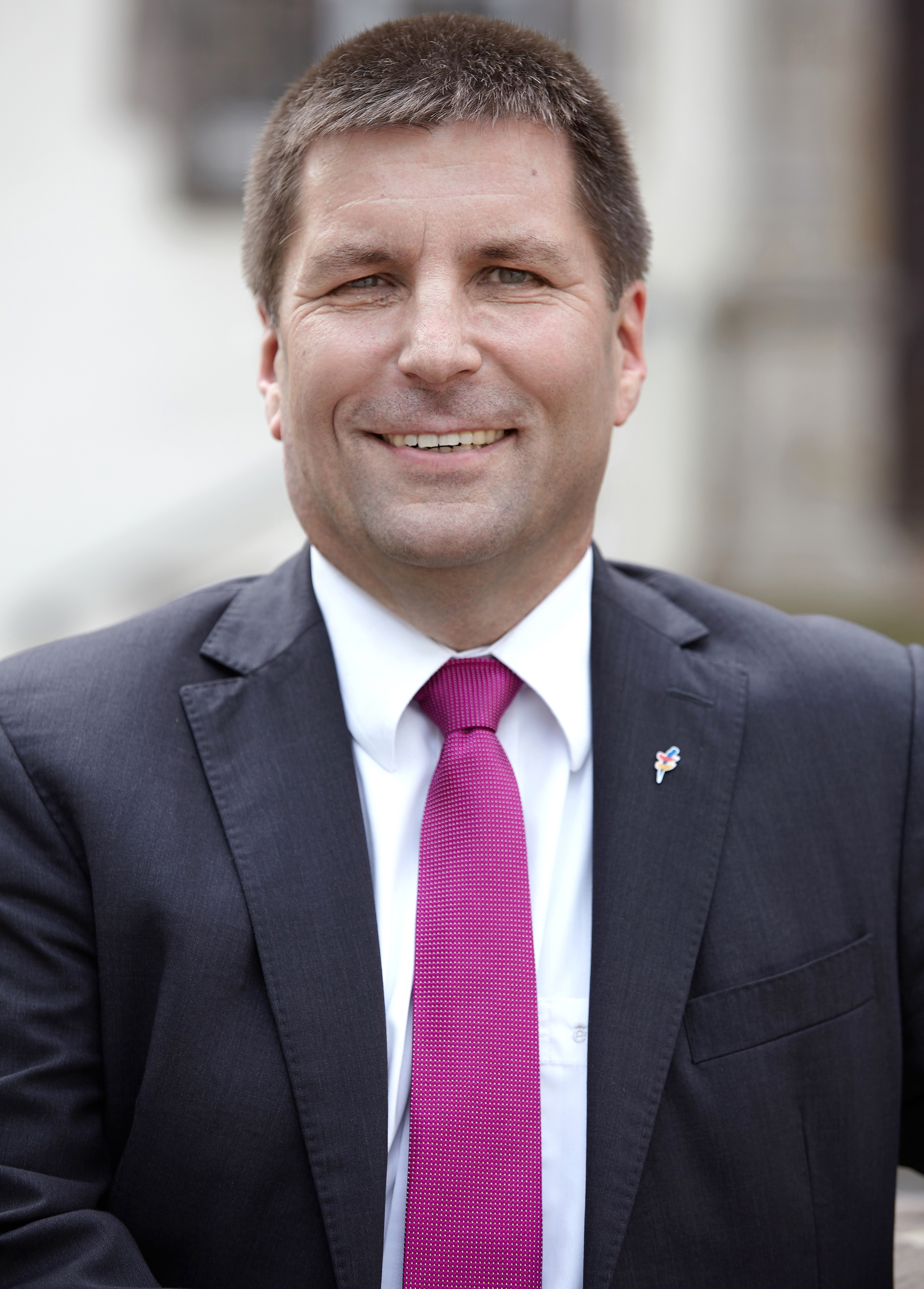 Ein Bild aus dem Wahlkampf 2016 für das Amt des Bürgermeisters in Bad Hersfeld